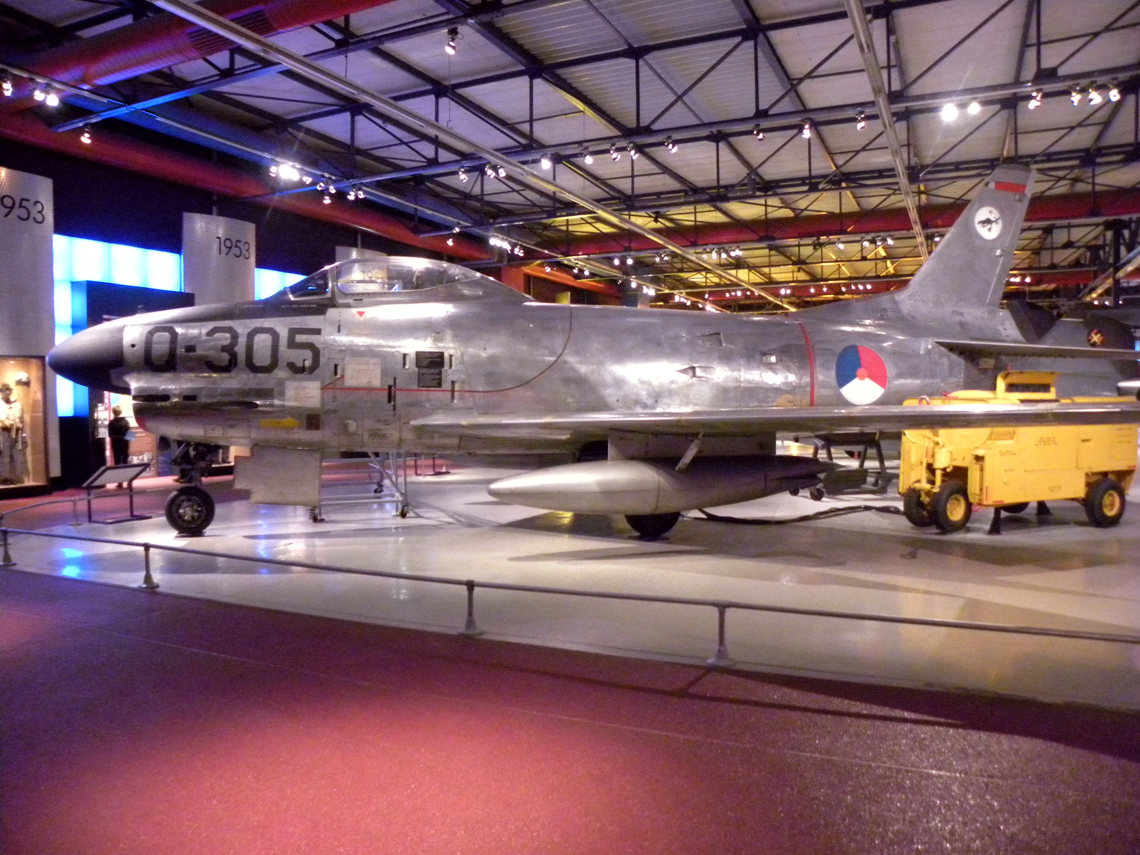 seen at militare luchtvaart museum Soesterberg